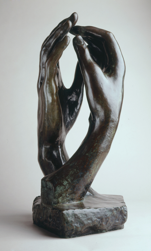 La catedral